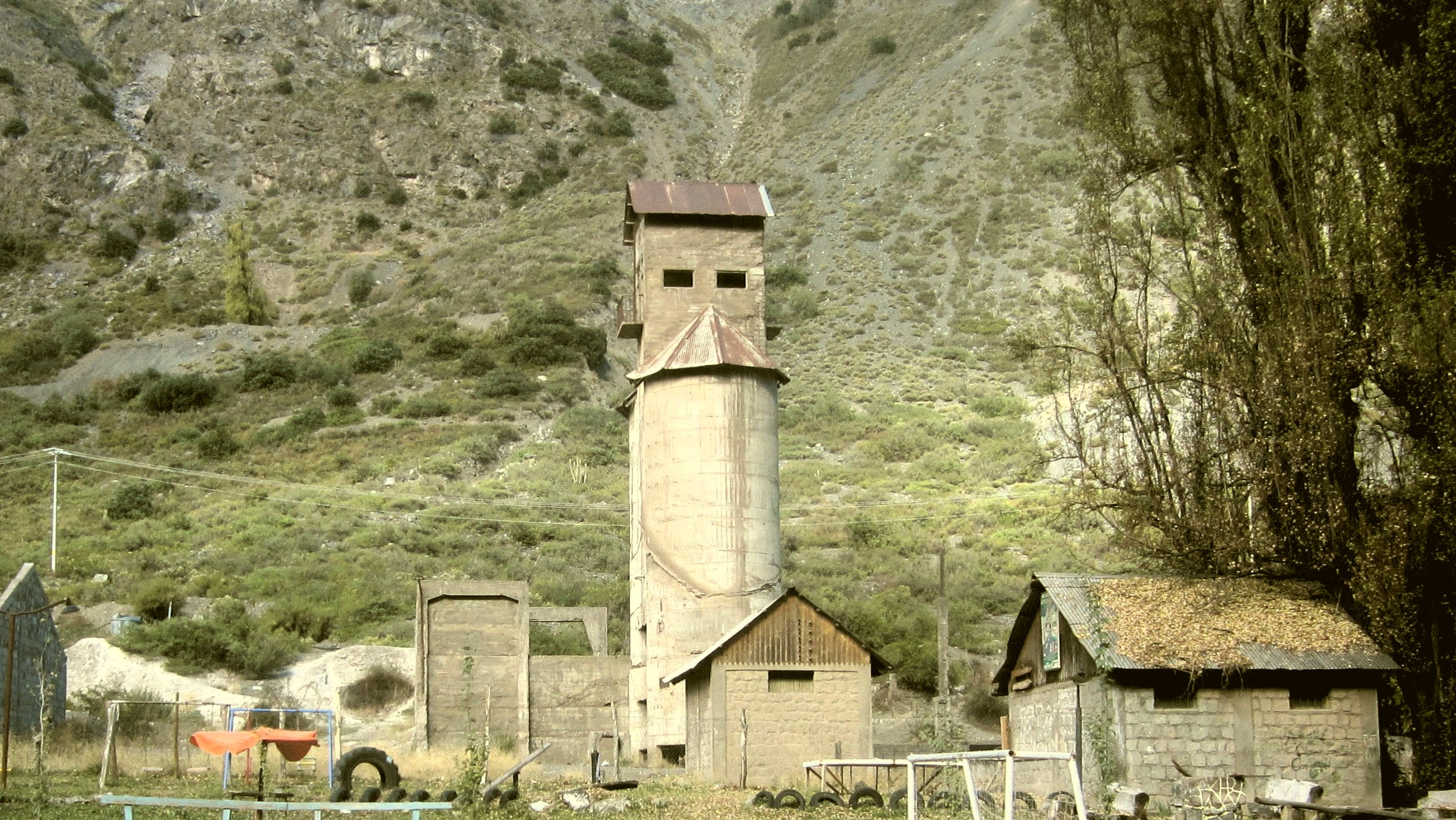 antiguo silo donde guardaban minerales